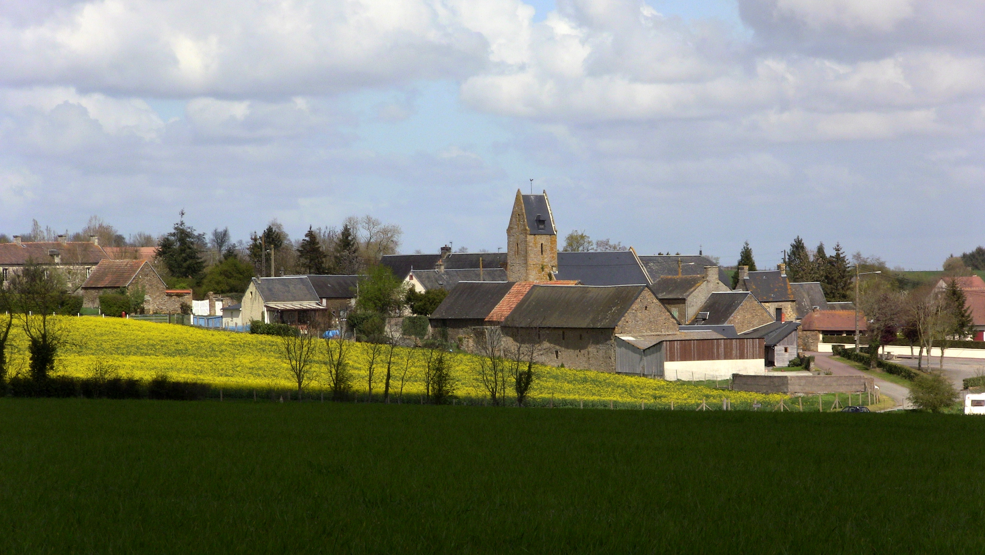 Une vue du village de Ouffières, Calvados.